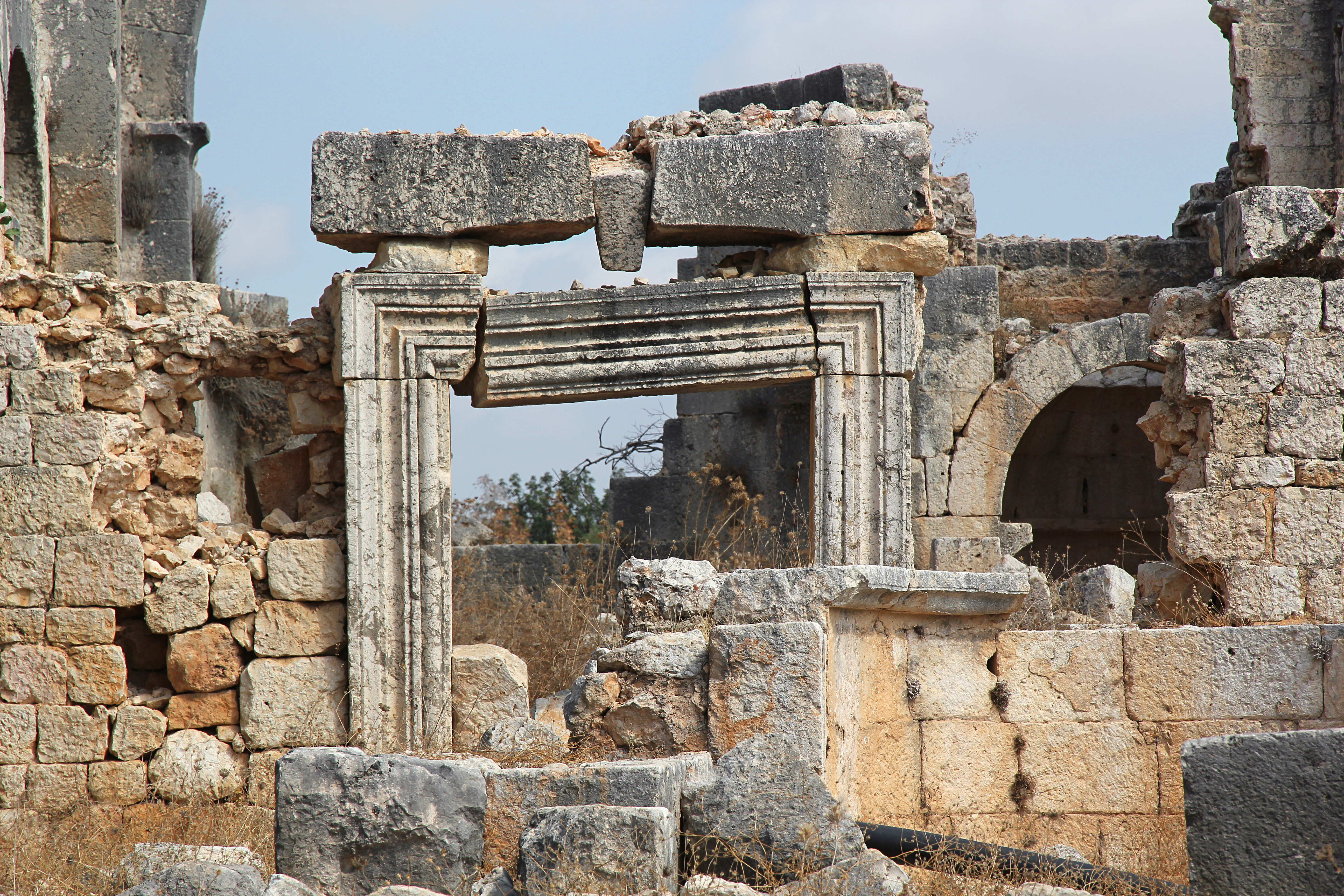 Köşkerli, römisch-frühbyzantinische Siedlung im Rauhen Kilikien, Südtürkei, mittlere Naostür der frühbyzantinischen Basilika